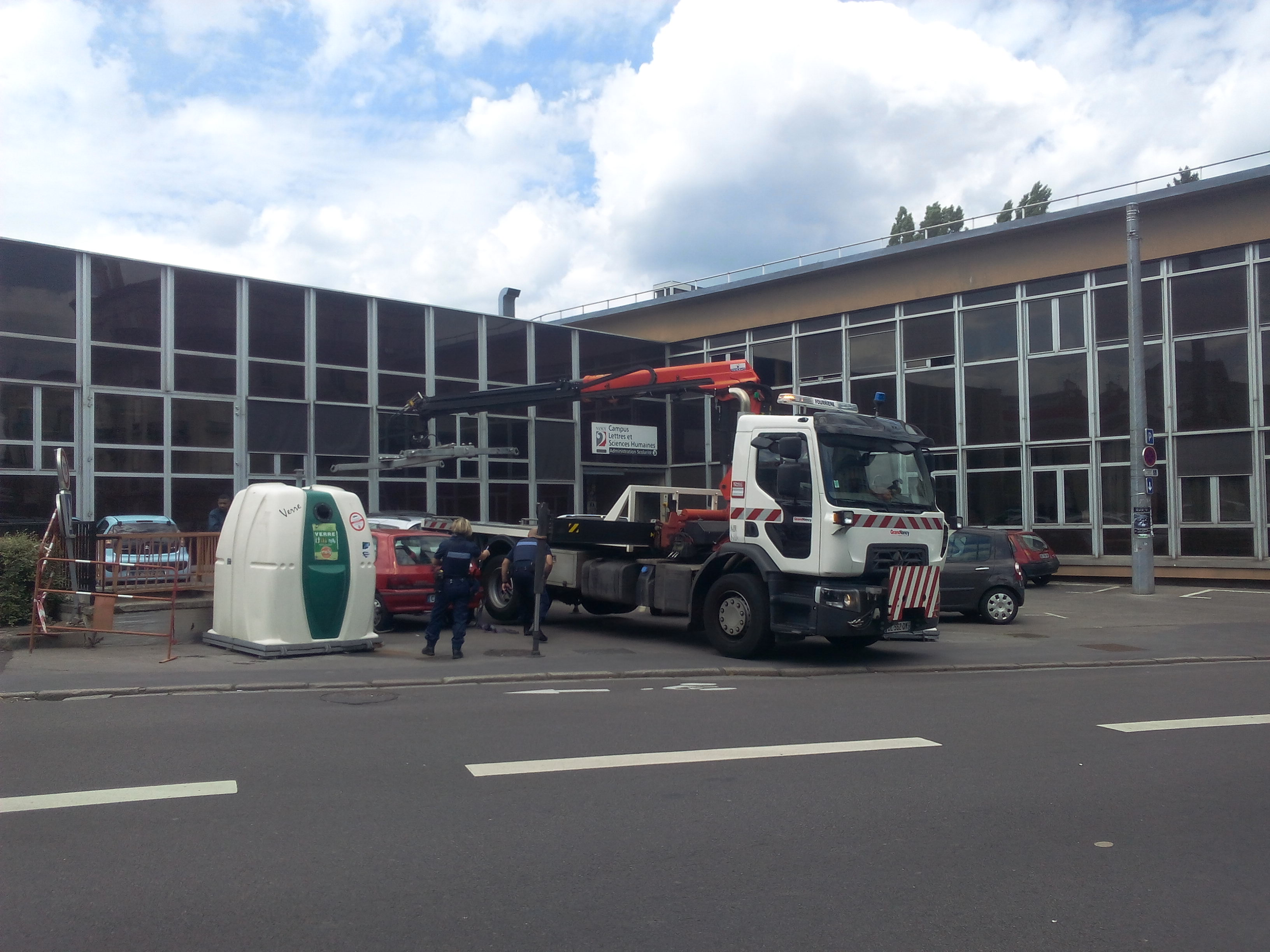 Camion de la fourrière municipale de Nancy